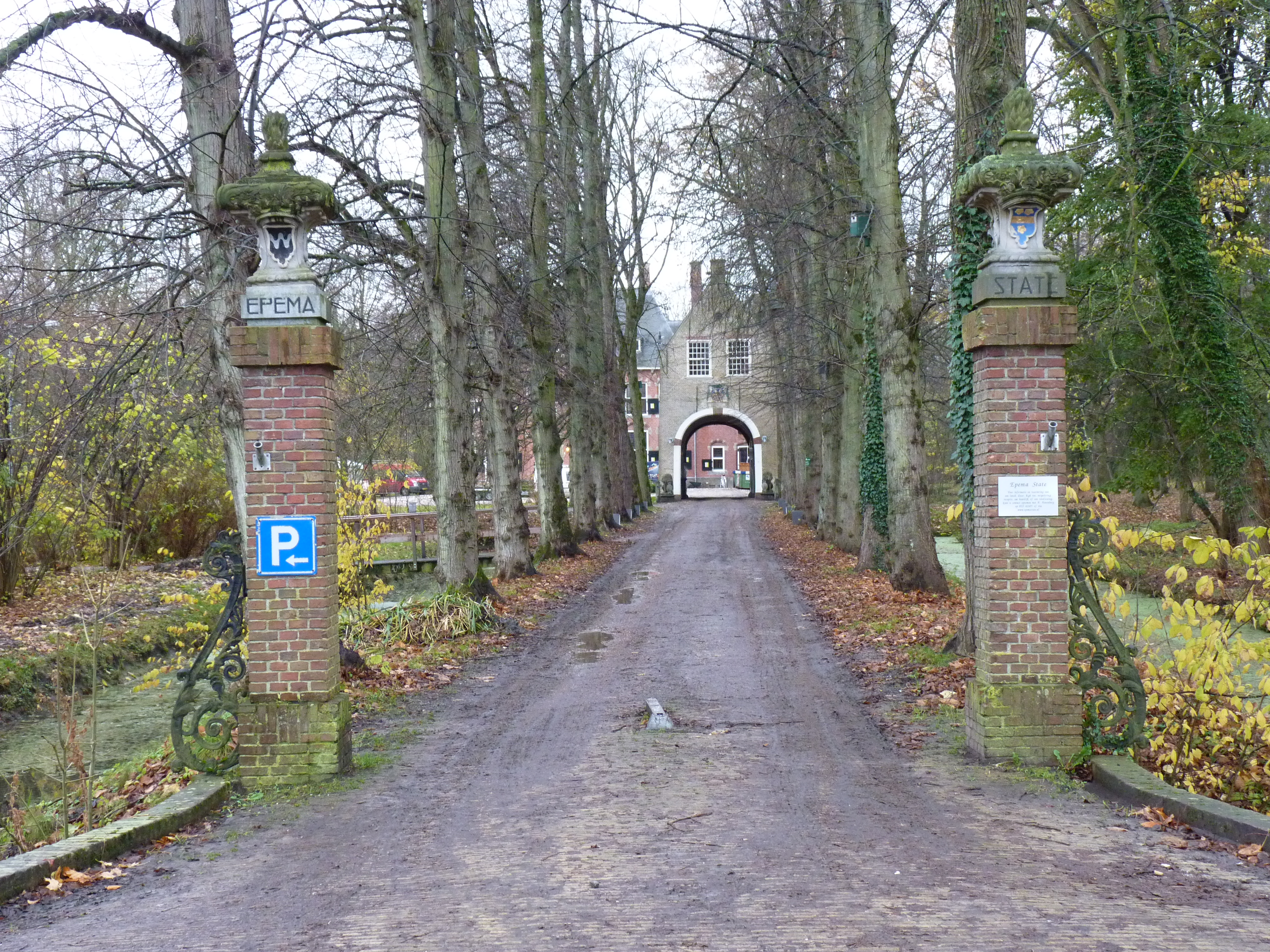 IJsbrechtum Epema State inrijlaan